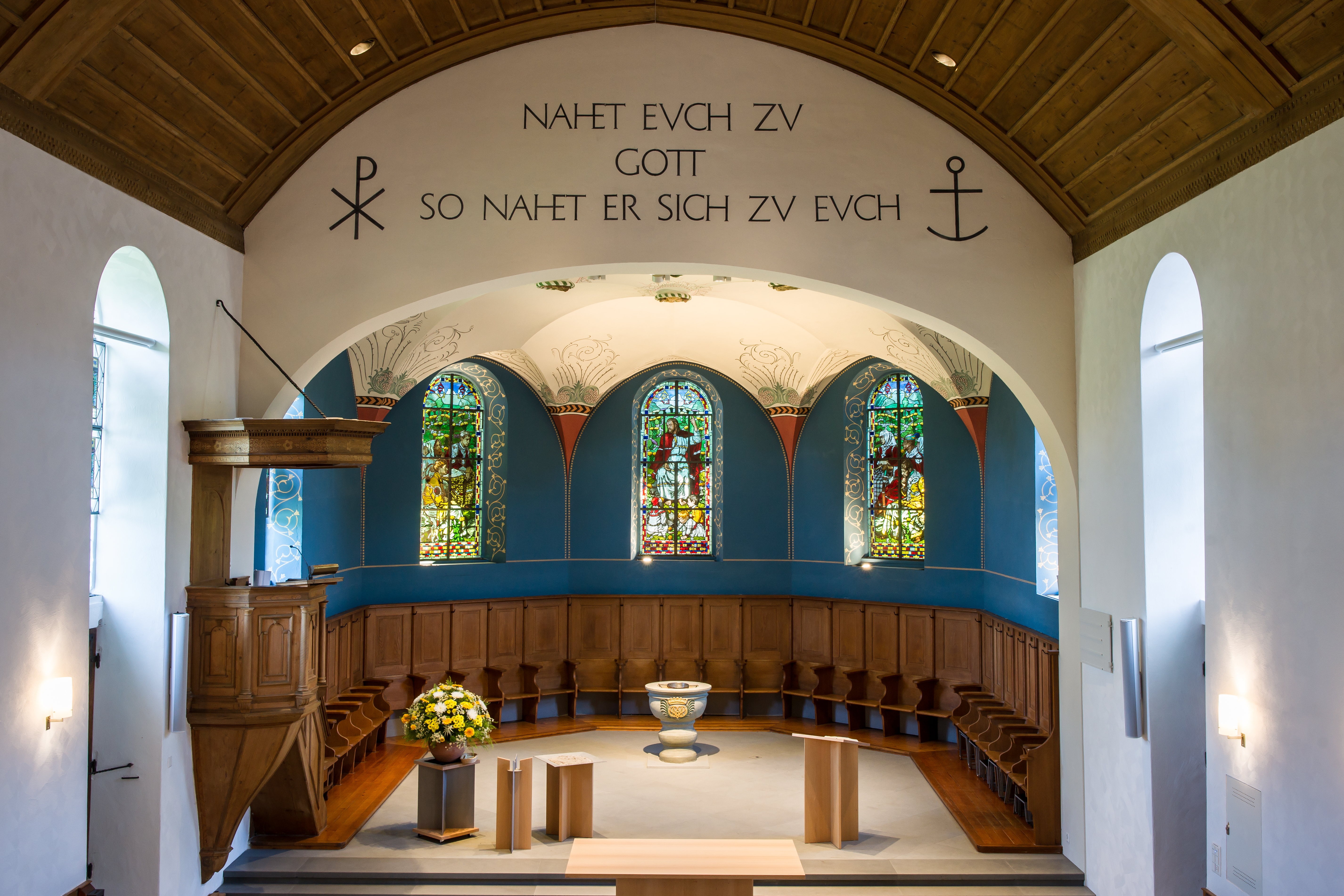 Restauration Chorbemalung 2015